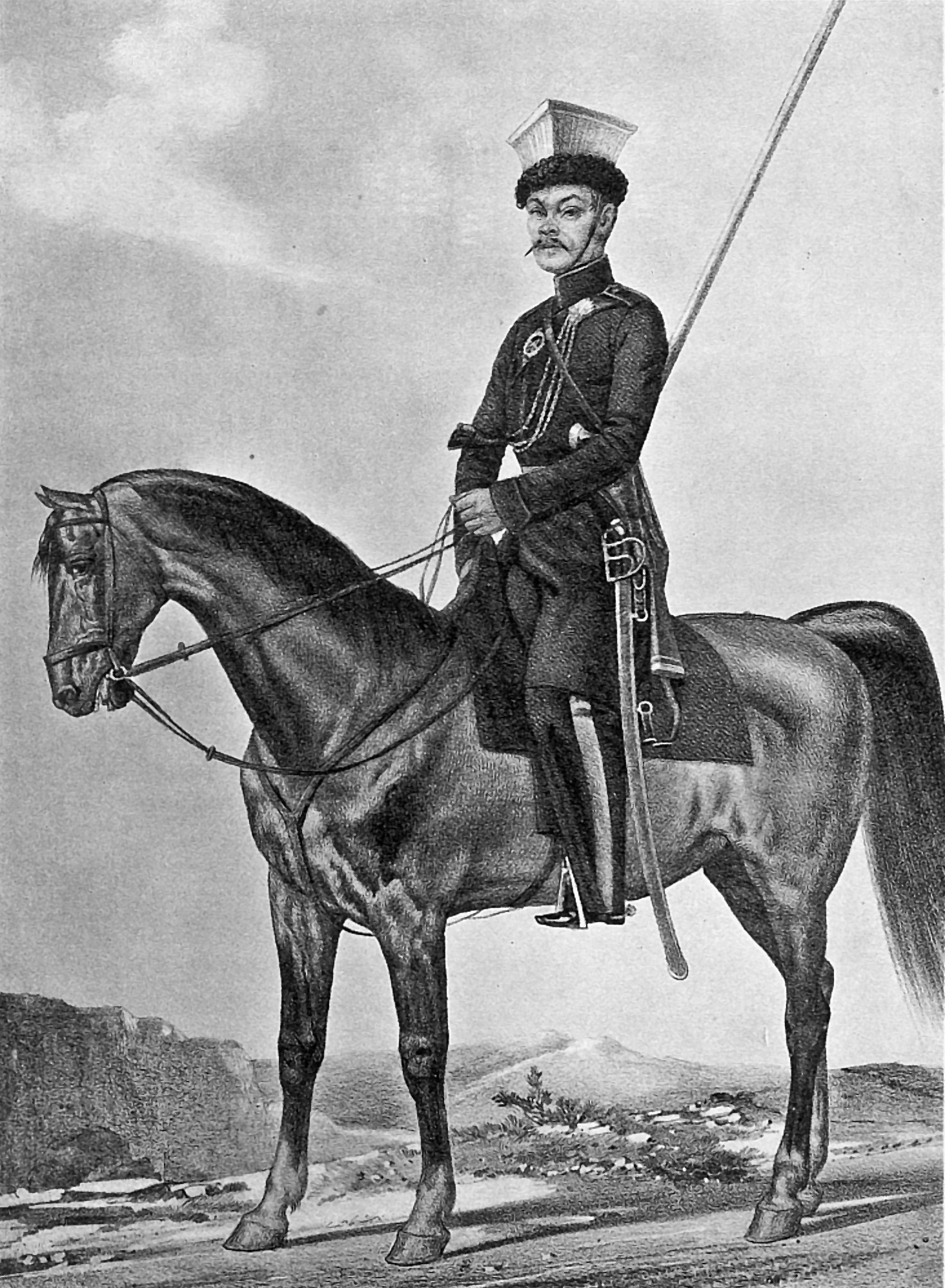 Рядовой Калмыцких полков, 1812-1825. Это изображение было также использовано для иллюстрирования статьи «Калмыцкое войско» опубликованной в одиннадцатом томе «Военной энциклопедии», который был издан книгоиздательским товариществом И. Д. Сытина в 1913 году в столице Российской империи городе Санкт-Петербурге.